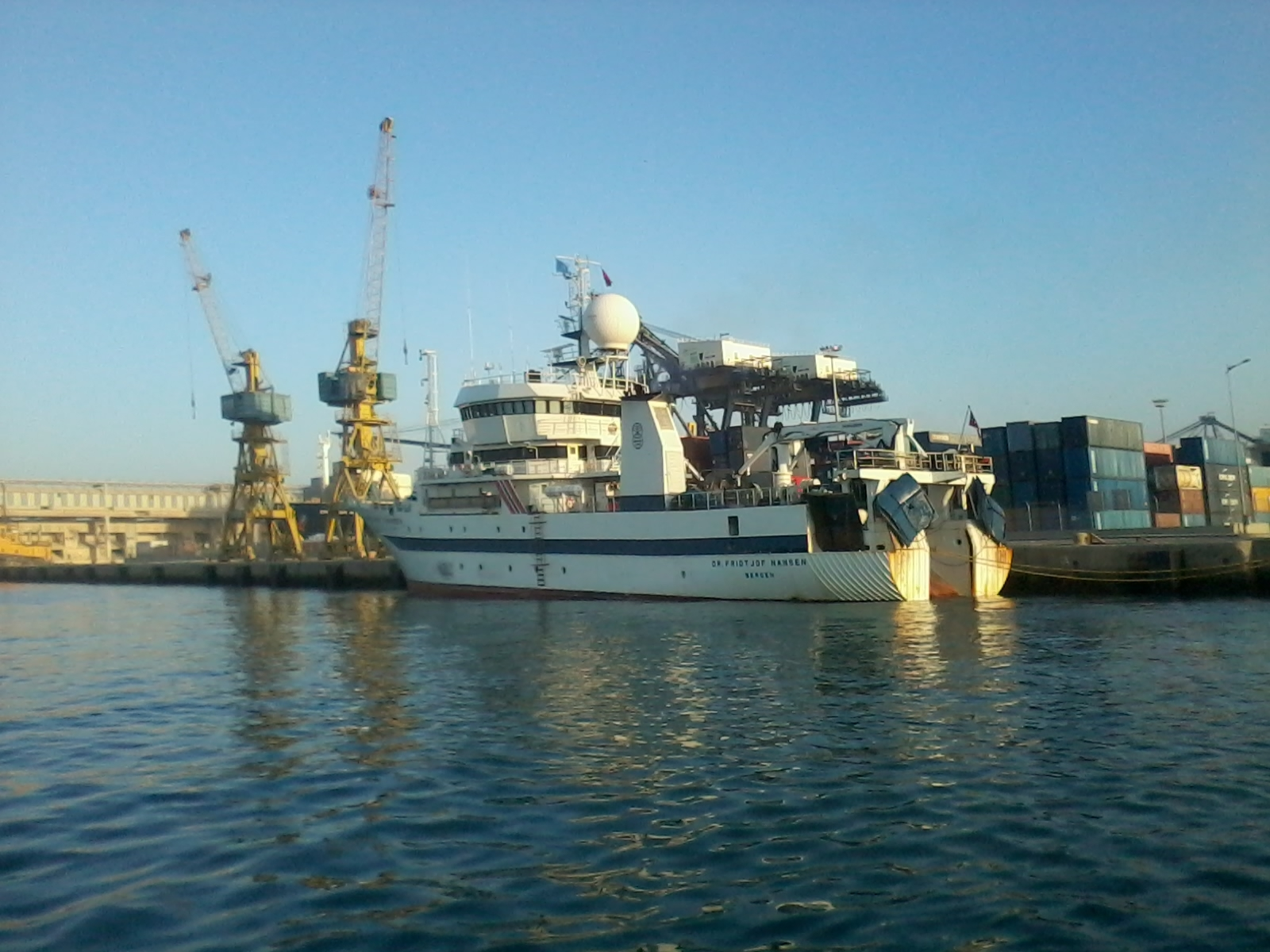 Navire scientifique DR. FRIDTJOF NANSEN à quai . Casablanca - Morocco - IMO: 9762716 Pavillon: Norway Genre du navire: Other Année de Construction: 2017